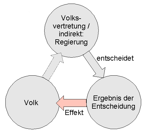 Schaubild Output-Legitimation Autor: C.Löser Erstellt mit: de: Draw